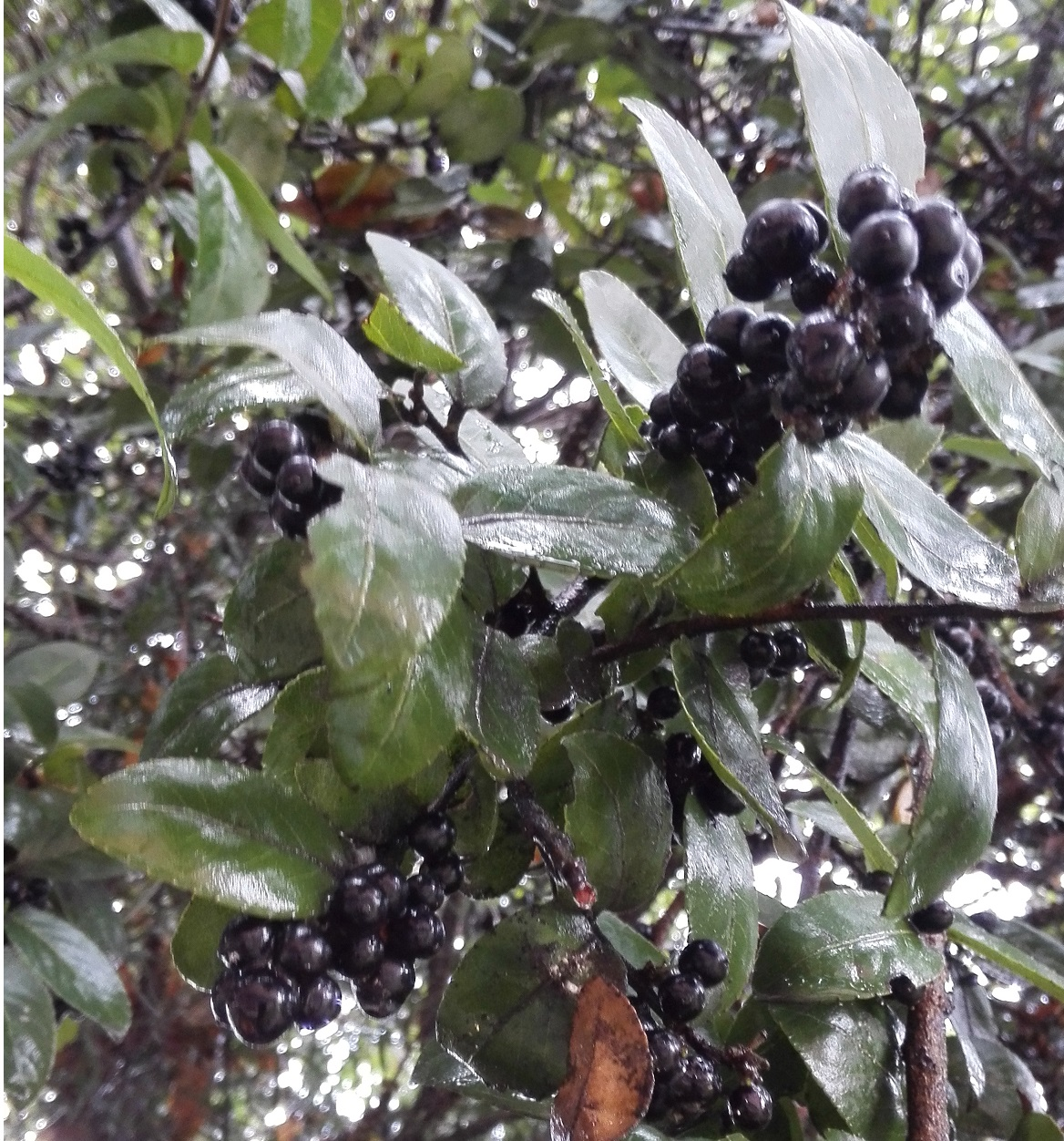 Frutos de Xylosma spiculifeum